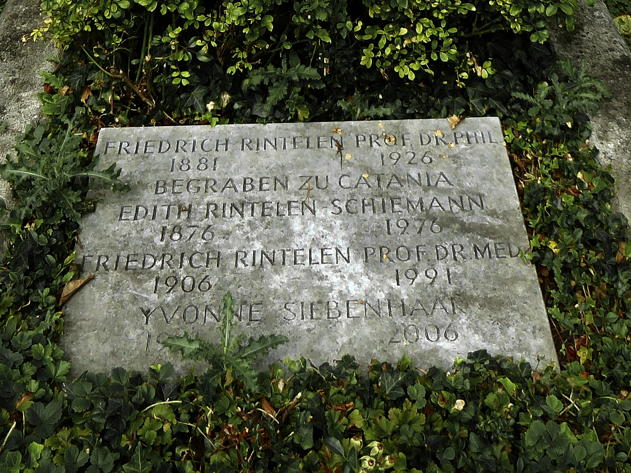 Friedrich Rintelen-Schiemann (1881–1926) Dr. Professor, Kunsthistoriker. Grabplatte auf dem Friedhof Wolfgottesacker, Basel